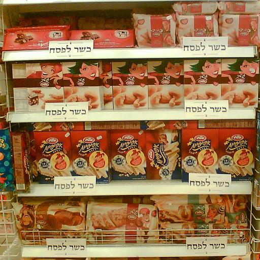 דוכן כשר לפסח. צילם דוד שי.